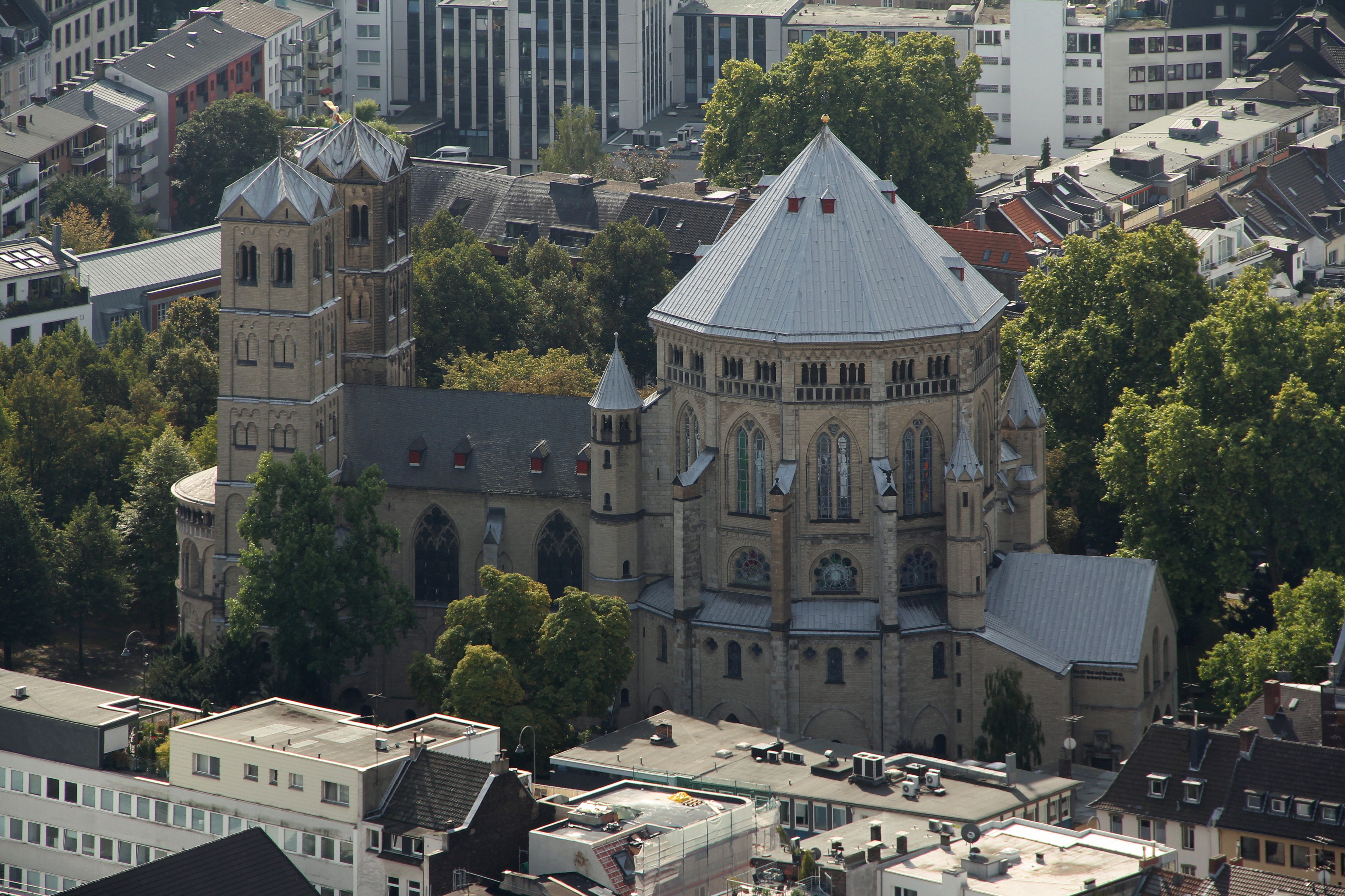 Sankt GereonThis is a photograph of an architectural monument.